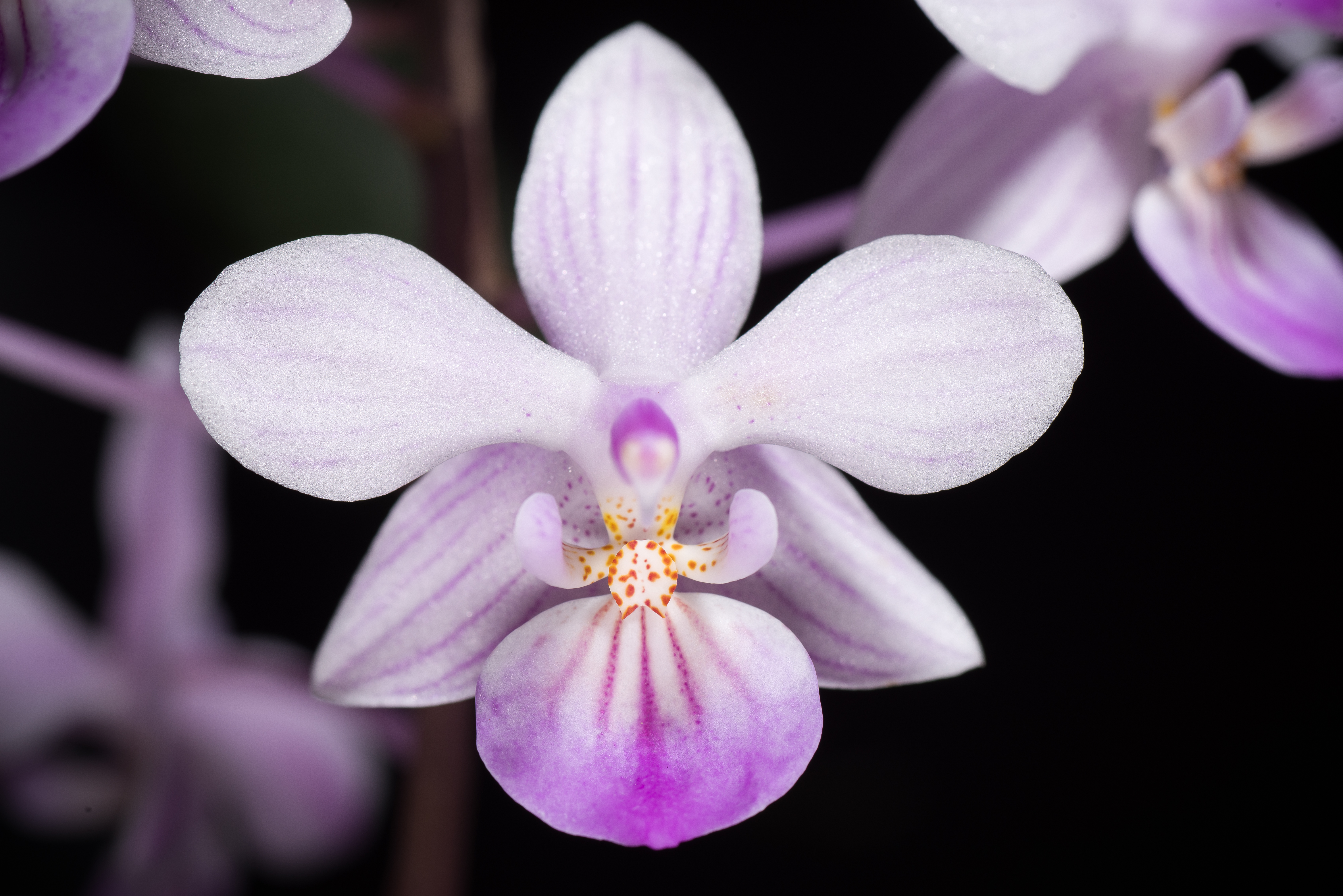 Phalaenopsis lindenii - (Philippines, Luzon)